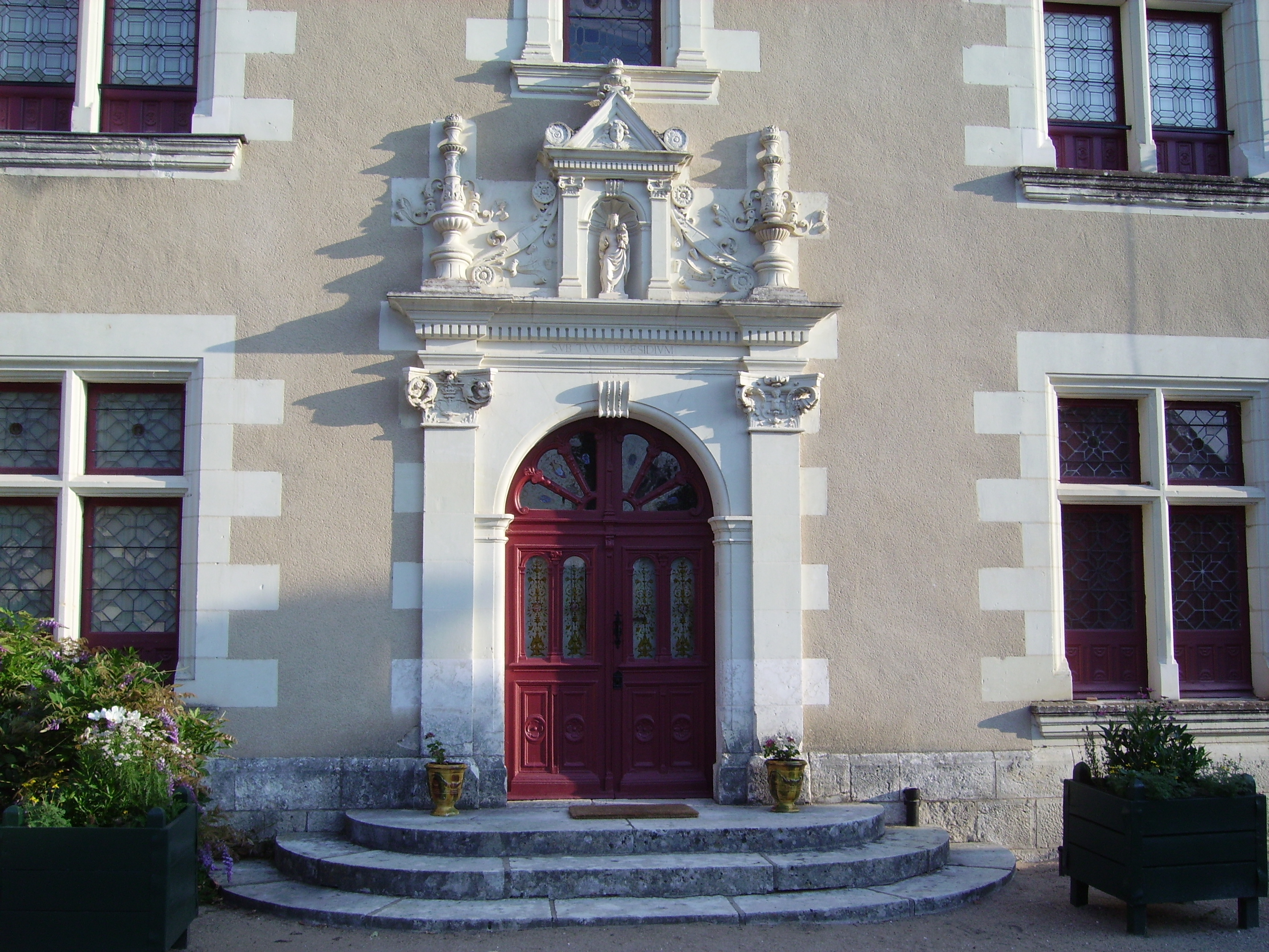 Château of Troussay, France. Door on principal facade. Château de Troussay, France, Loir et Cher. Porte de la façade François Ier.